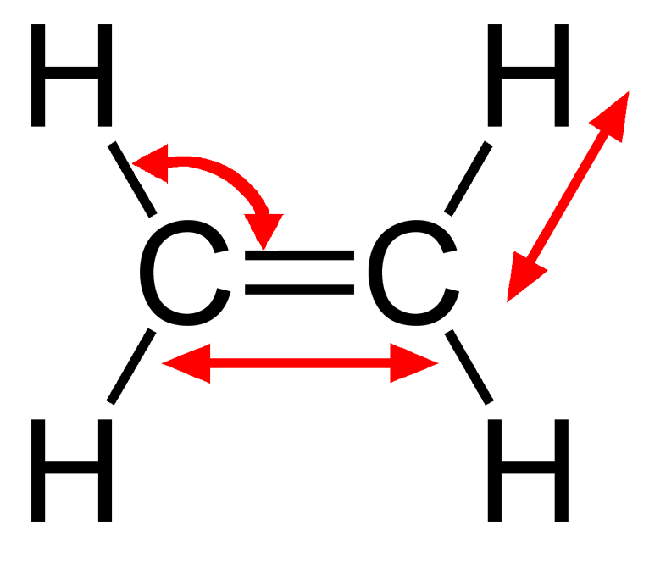 אופני התנודה בויברציה של מולקולת אתן.